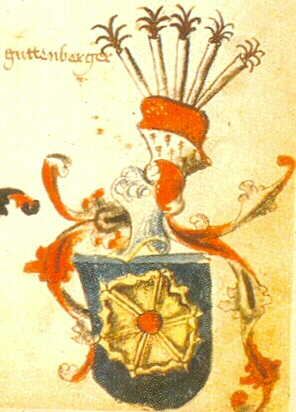 Wappen der Familie von Guttenberg